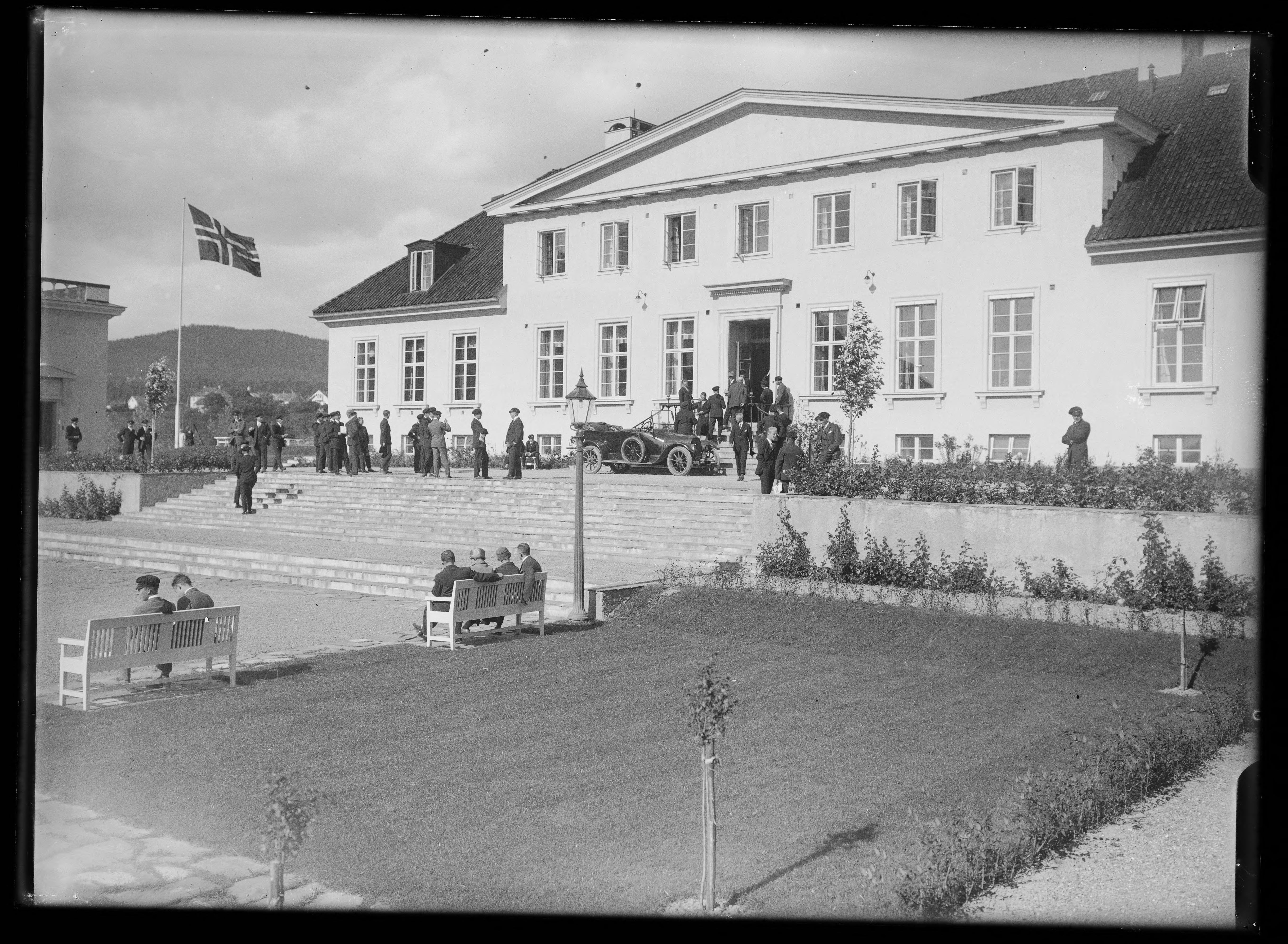 Bildet er hentet fra Nasjonalbibliotekets bildesamling. Anmerkninger til bildet var: Påskrift arkivark: Studenterhjemmet Blindern Arkivnummer: 550 Blindern, Oslo, Oslo